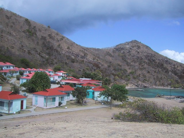 "Les Saintes" UCPA center